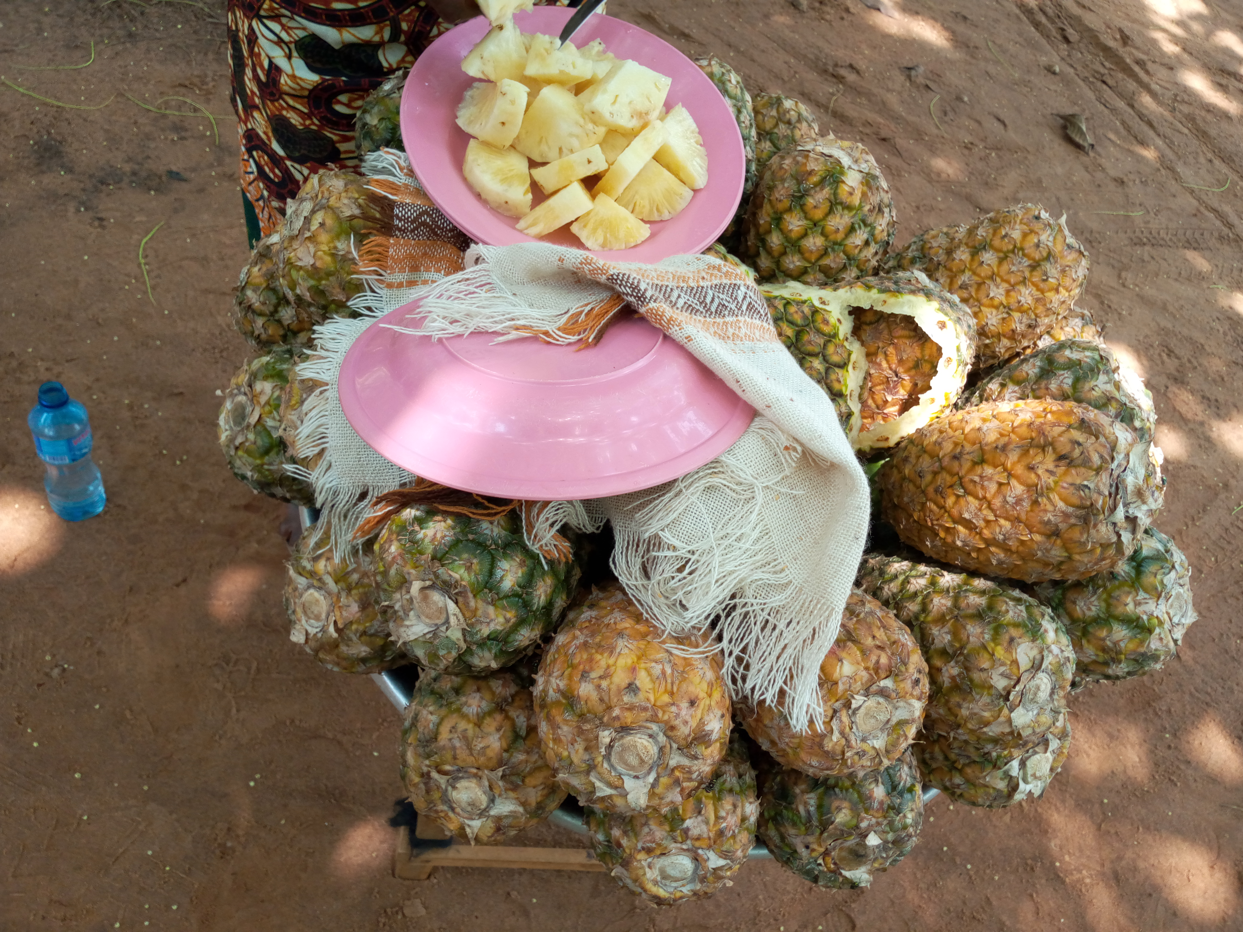 Une autre forme de Vente ambulante de l'ananas dans la commune d'Avrankou au Bénin